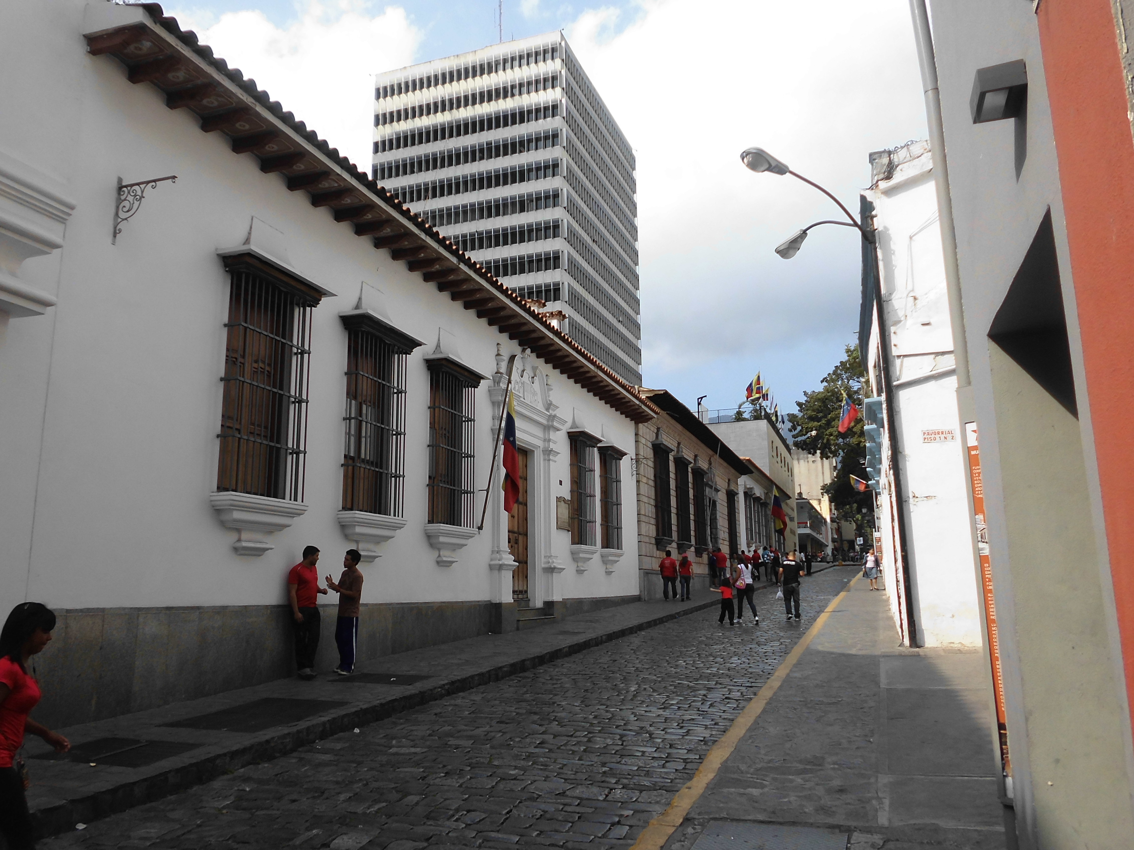 Sociedad Bolivariana y de fondo Casa Natal del Libertador del lado derecho a la misma